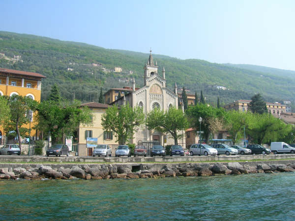 Castelletto di Brenzone, Italy